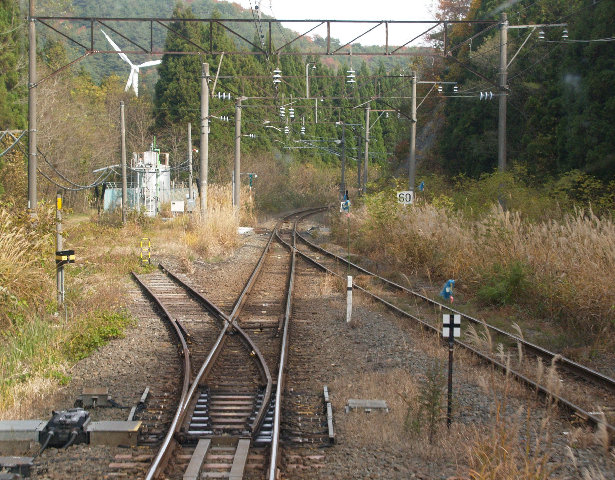 沼上信号場（中山宿寄りのポイント。郡山行列車の先頭から撮影）